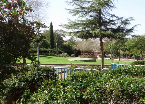 פארק באריאל